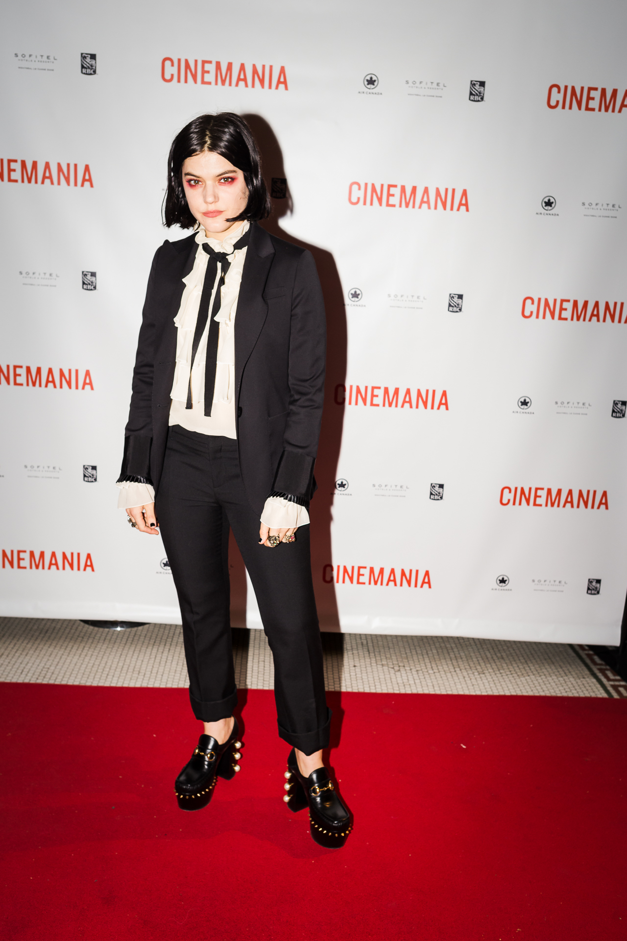 Soko Cinemania 2016